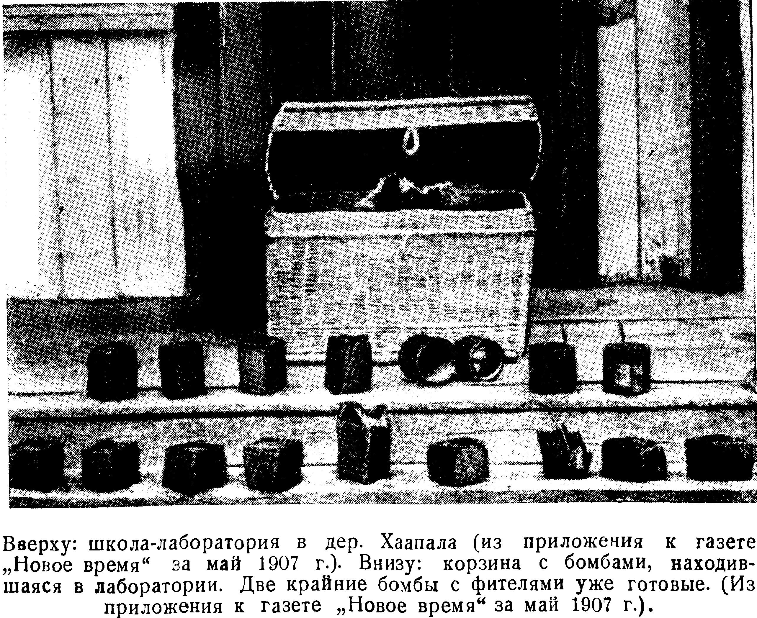 Корзина с бомбами, находившаяся в большевистской школе-лаборатории в деревне Хаапала (Ленинское). Две крайние бомбы с фитилями уже готовые. Bombs found in 1907 in the bolshevik explosives lab in Haapala village in Terijoki, Grand Duchy of Finland (now Leninskoye in Zelenogorsk, Saint Petersburg).